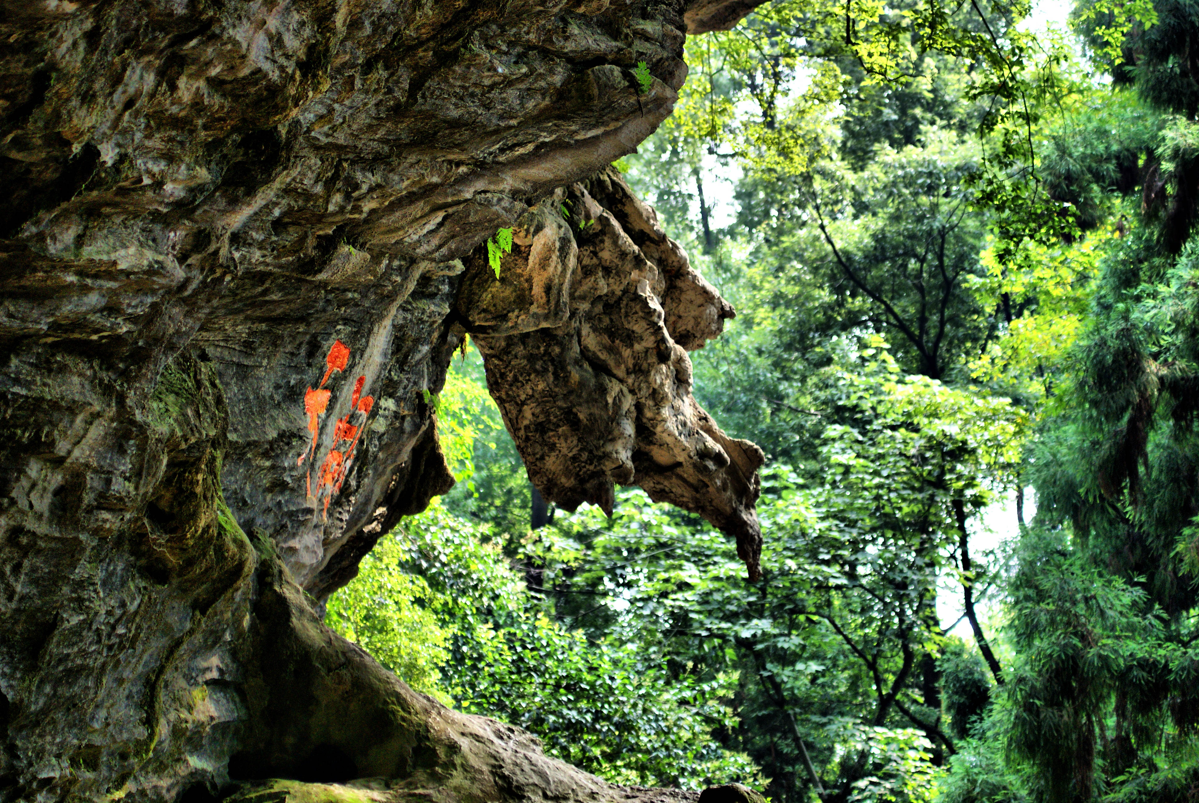 Jinhua-İki dragon mağarası-Çin